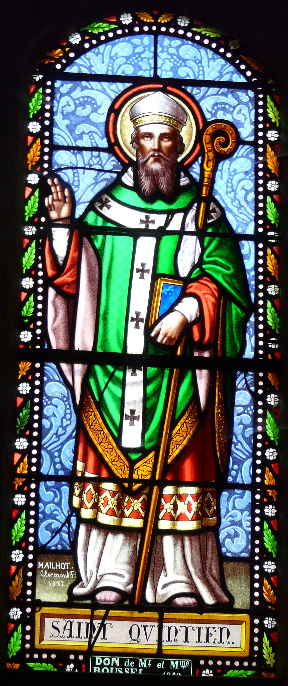 Vitrail de 1882 représentant saint Quintien, église Saint-Quintien de Picherande, Puy-de-Dôme, France. Œuvre de Martial Mailhot.